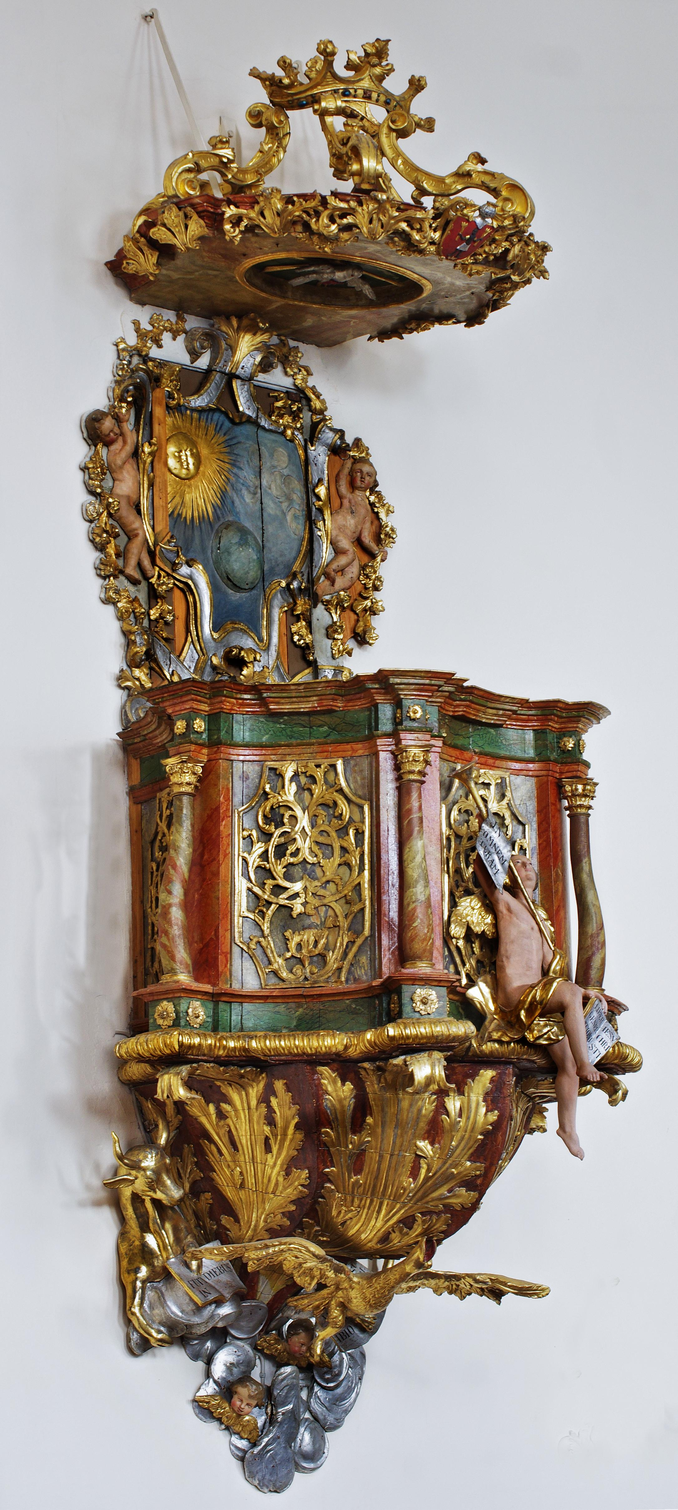 Die Kanzel Bilder aus dem Innenraum der Ursulakirche